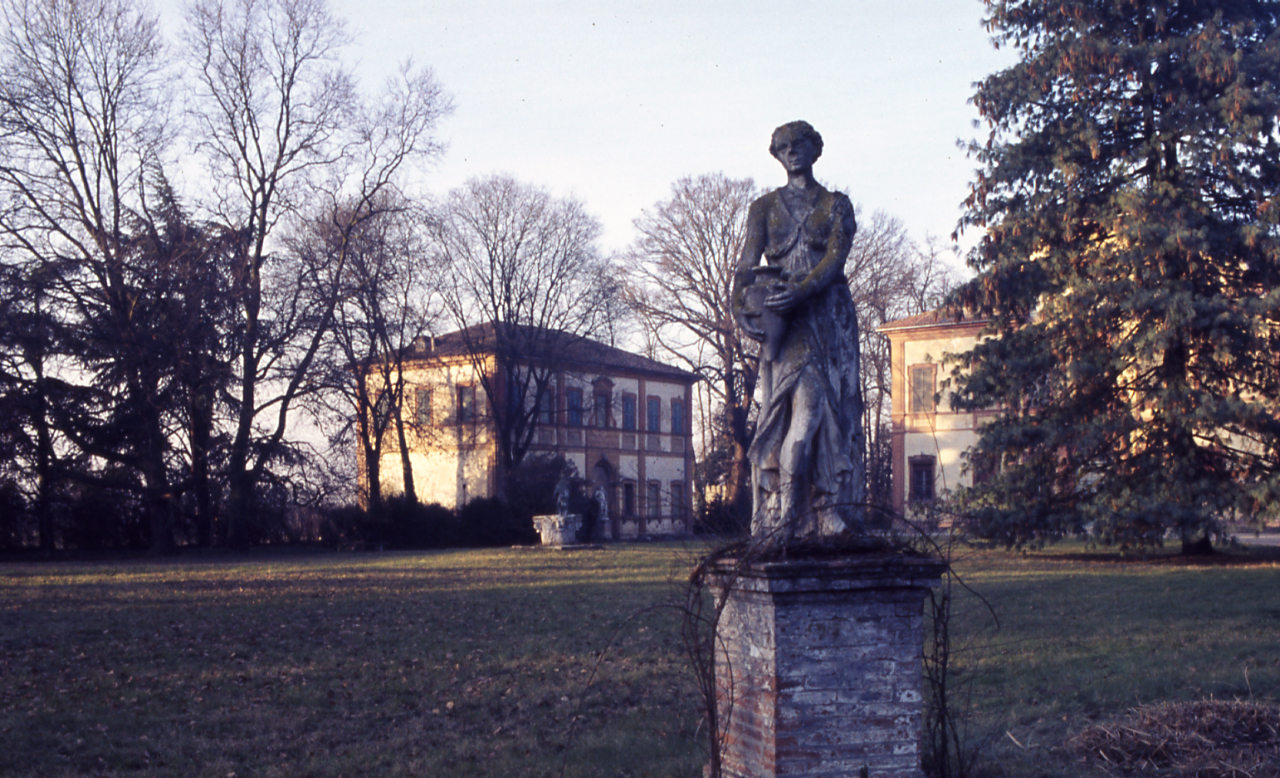 Ferrara (territorio). Voghiera. Voghenza. Villa Massari Ricasoli, oggi Mazzoni: esterni e parco annesso. negative circa relative alla campagna fotografica eseguita nel periodo dicembre '74-febbraio '75 [...] - Mesola, Valli di Comacchio, Verginese, Belriguardo, Copparo, Pomposa, Chiaviche, Bonifiche, La Stellata, Cento etc. - Fonte: Monografia: Territorio ferrarese: un programma di governo della Regione e delle autonomie locali, catalogo della mostra, Ferrara 1975, a cura di Roberto Fregna, Modena, Soc. Immobiliare & Poligrafica emiliana (1975). - Fonte: Fattura di Paolo Monti: IV. Commesse/ Fattura n. 16/ Diapositive per audiovisivo Regione Emilia-Romagna (1973/10/22), presso Archivio Paolo Monti. N. 1000 diapositive a colori formato 35mm sugli aspetti del patrimonio naturale, artistico e culturale della Regione. Dal territorio di Parma e Piacenza, fino a Ravenna e oltre [...] compreso il ferrarese [...]